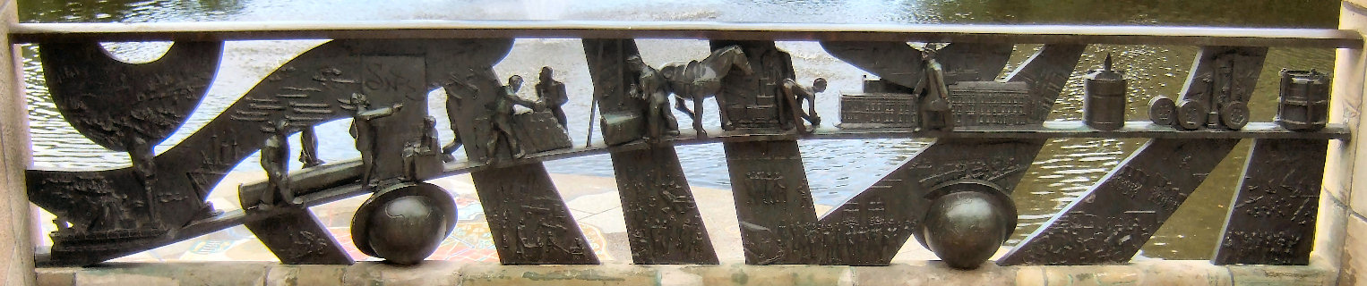 Detail van monument voor G.J. de Jongh, Museumpark Rotterdam